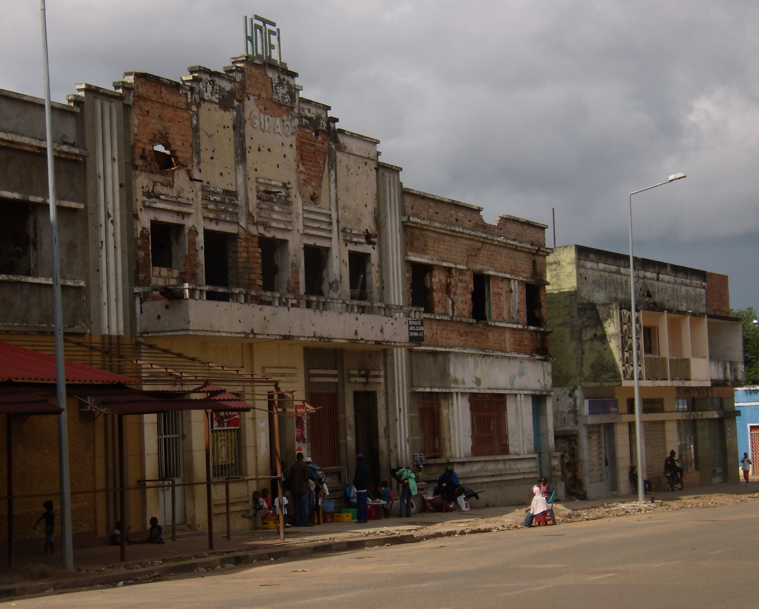 Hotel Girão